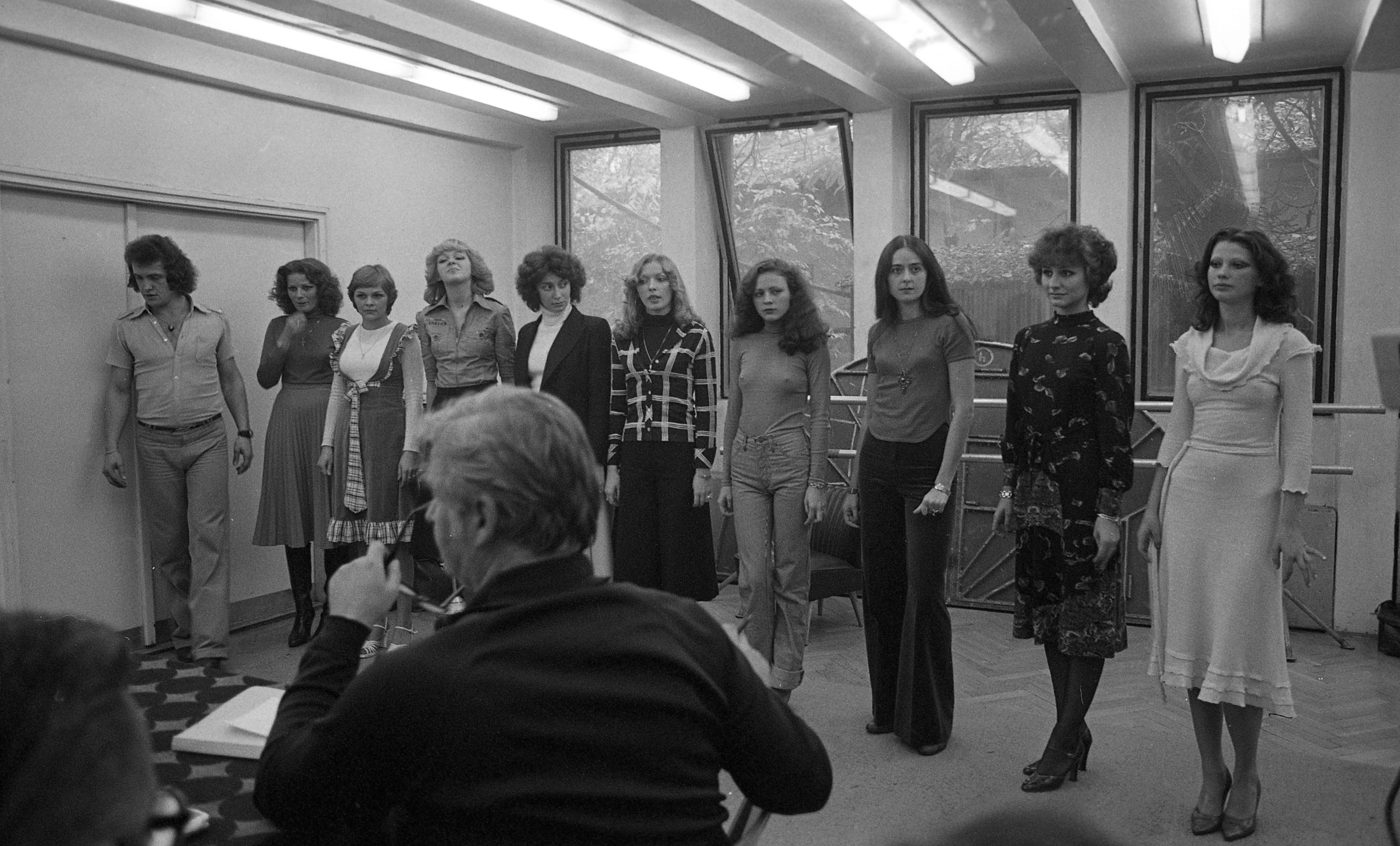 Állami Artistaképző Intézet, manökenjelöltek felvételi vizsgája. Location: Hungary, Budapest VII. Tags: photo model, Budapest Title: Állami Artistaképző Intézet, manökenjelöltek felvételi vizsgája.